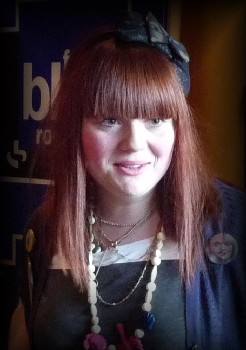 Luce lors d'une interview à France Bleu Roussillon .